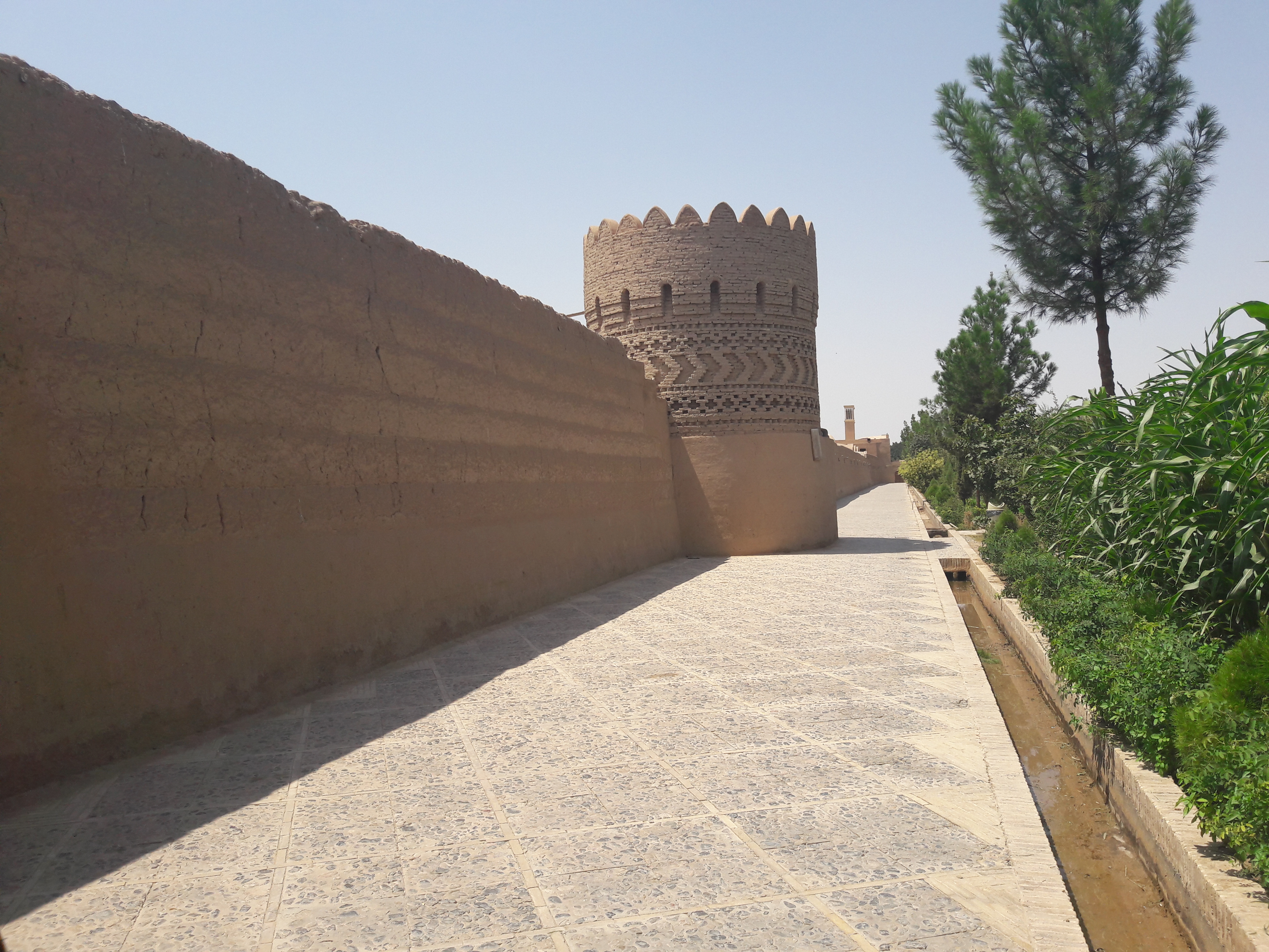 برج دیده‌بانی باغ دولت‌آباد یزد